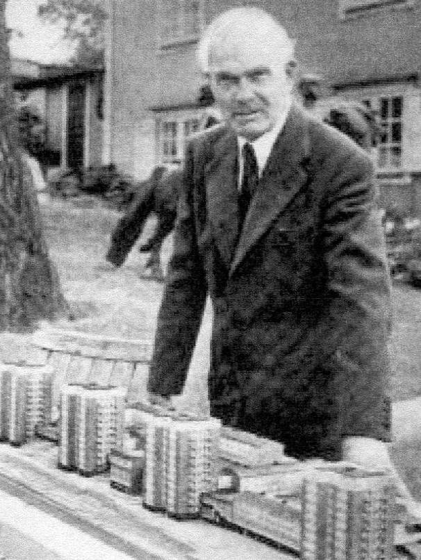 Byggmästare Olle Engkvist med modellen för Hässelby Familjehotell